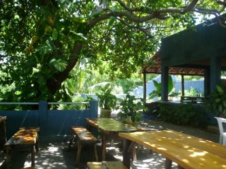 Restaurante Playa Jaguey